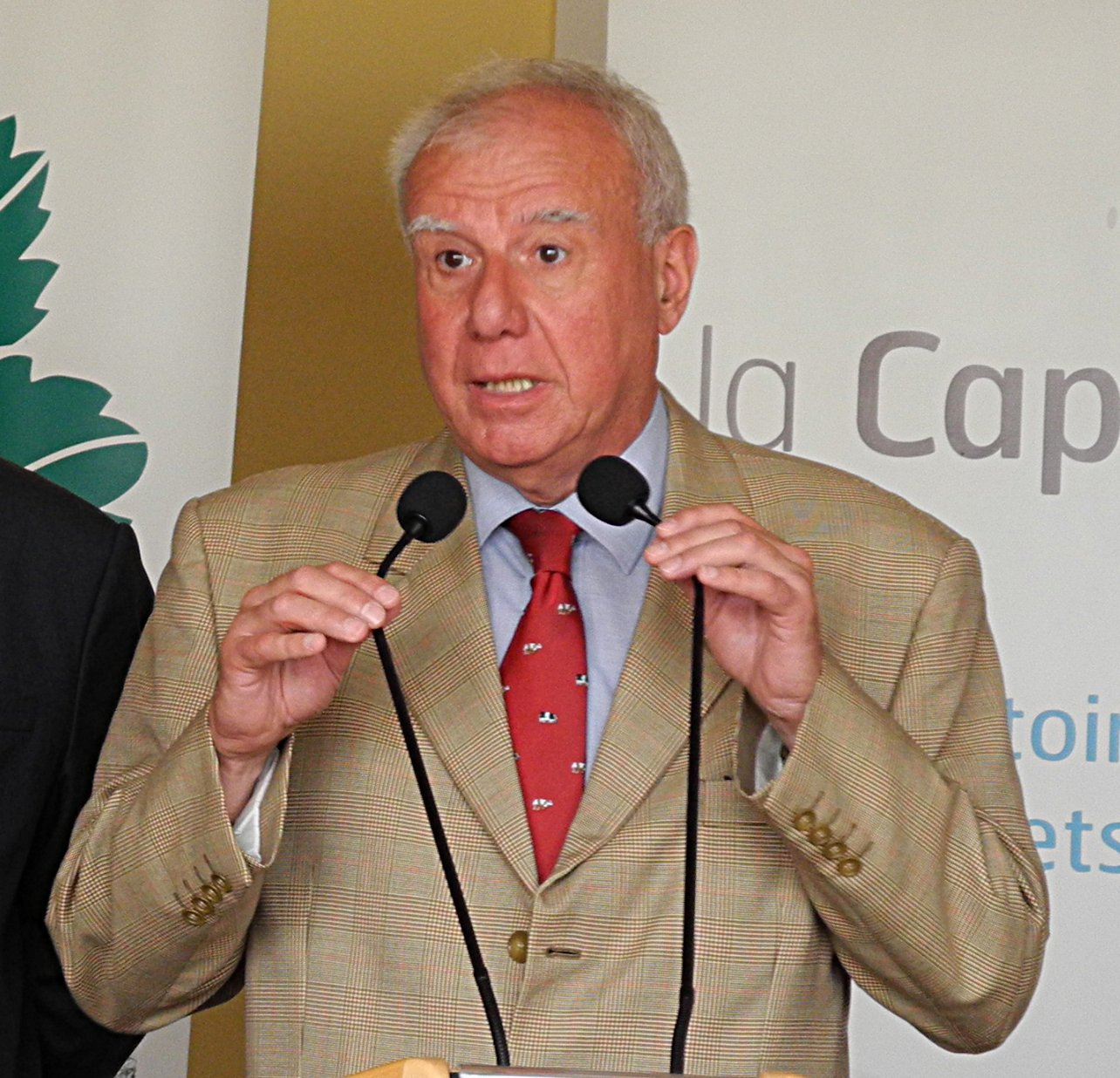 Franck Gilard, député de l'Eure